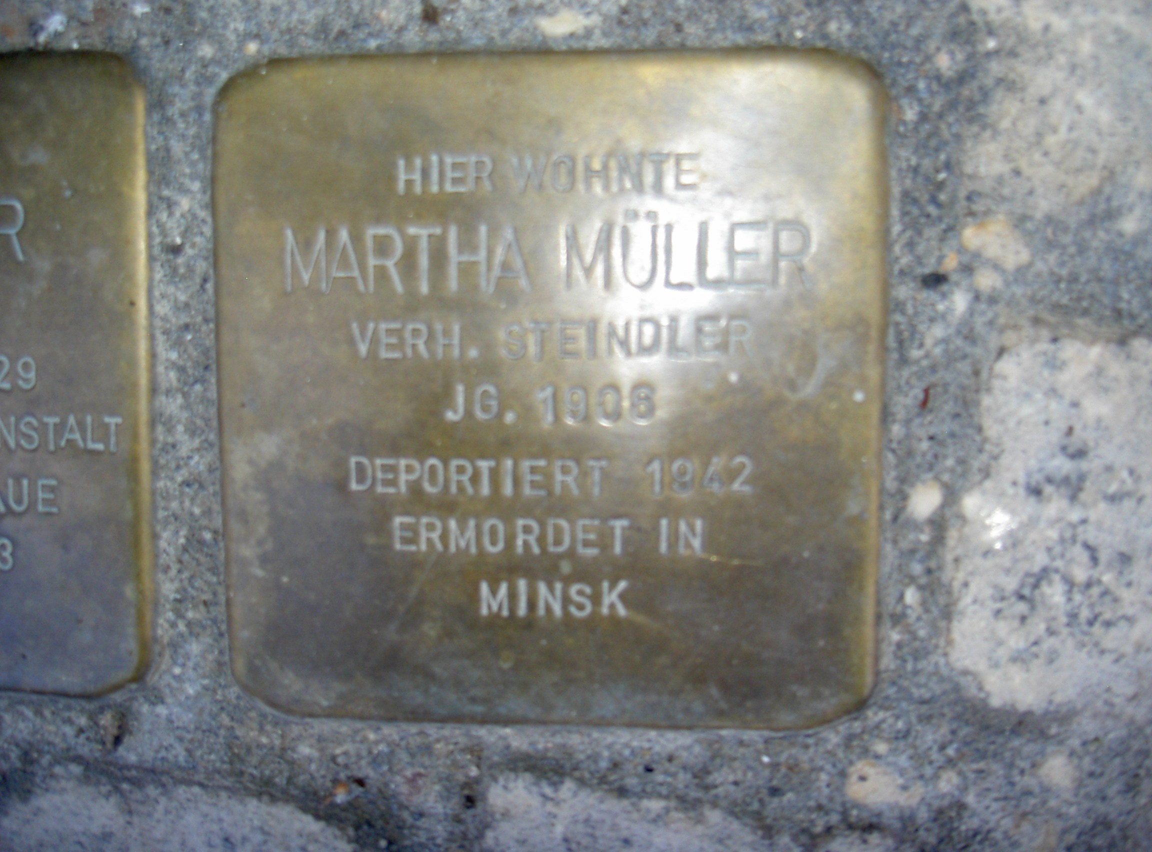 Stolperstein in Themar Müller Martha